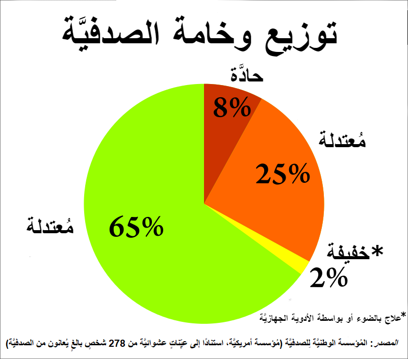 رسمٌ بياني دائري يُظهر توزُّع وخامة الصدفيَّة عند الإنسان.